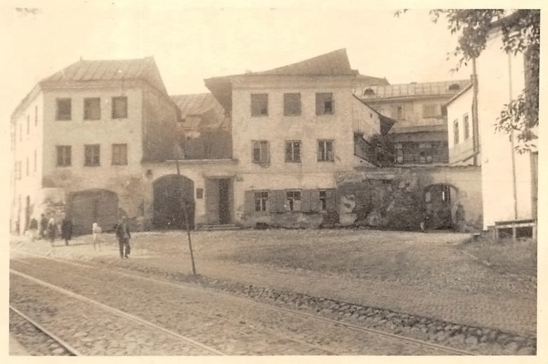 Беларуская (тарашкевіца): Менск (Miensk), рог вуліцы Вялікай Бэрнардынскай (vulica Vialikaja Bernardynskaja) і завулка Казьмадзям’янаўскага (zavułak Kaźmadziamjanaŭski). Малы гасьціны двор